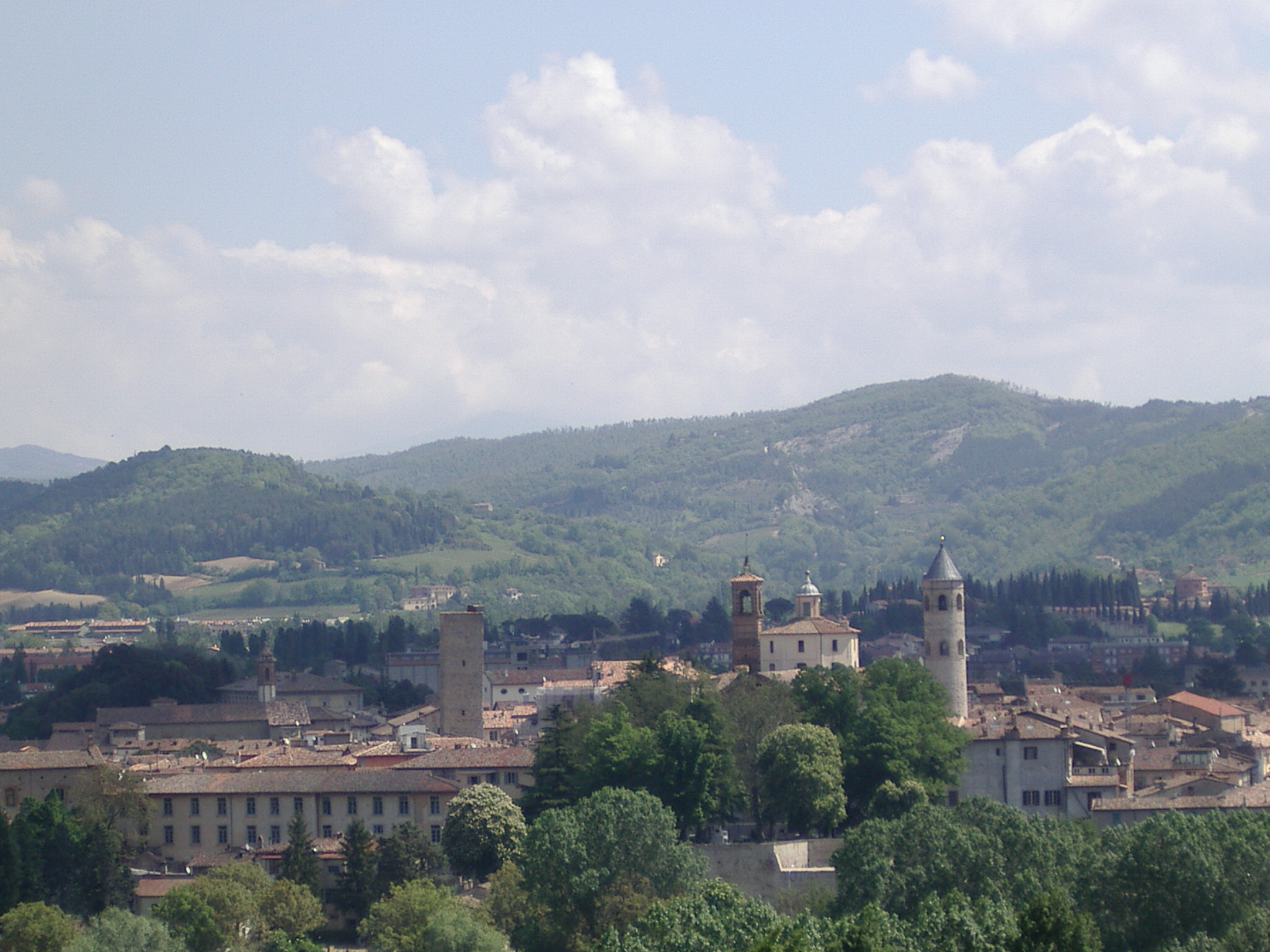 Città Di Castello Panorama Ombrie Italy